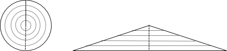 Methode des indivisbles pour la quadrature du cercle. Author HB.